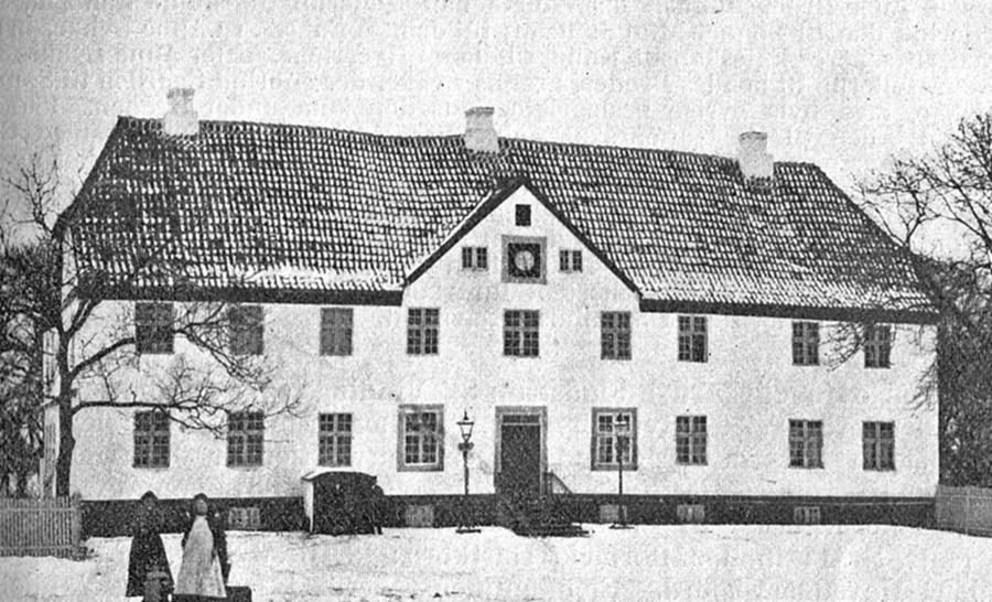 Rørbæk er en gammel hovedgård, som nævnes første gang i 1438. Gården ligger i Flødstrup Sogn, Vindinge Herred, Ullerslev Kommune. Hovedbygningen er opført i 1925.